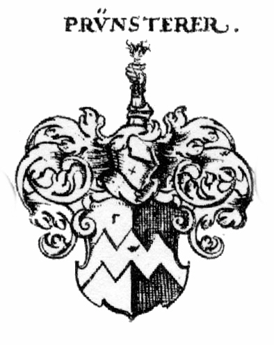 Wappen der Nürnberger Patrizierfamilie Prünsterer